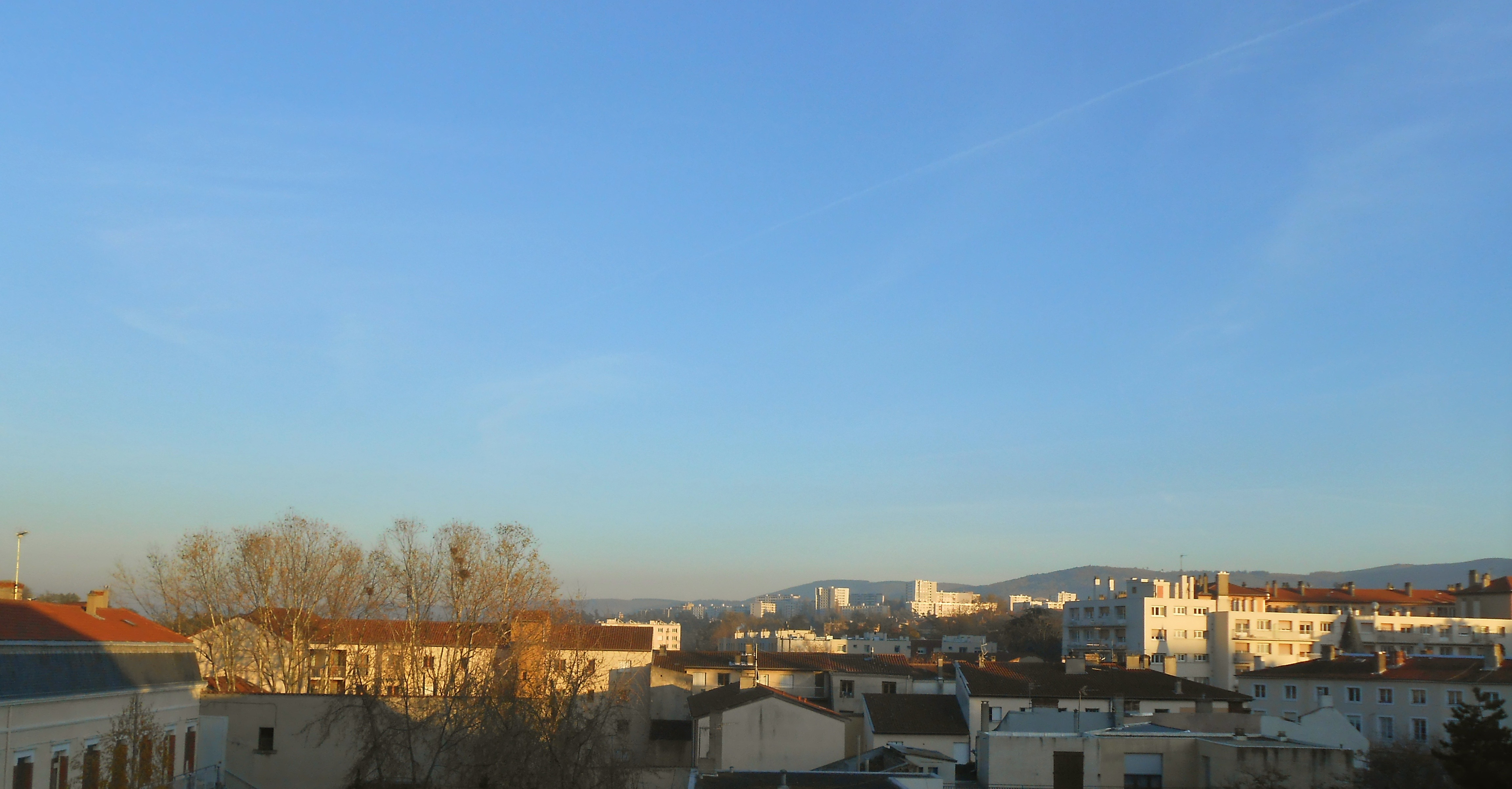 Saint-Chamond (Loire), vue d'ensemble avec la cité de Fonsala au fond, 3 décembre 2013.